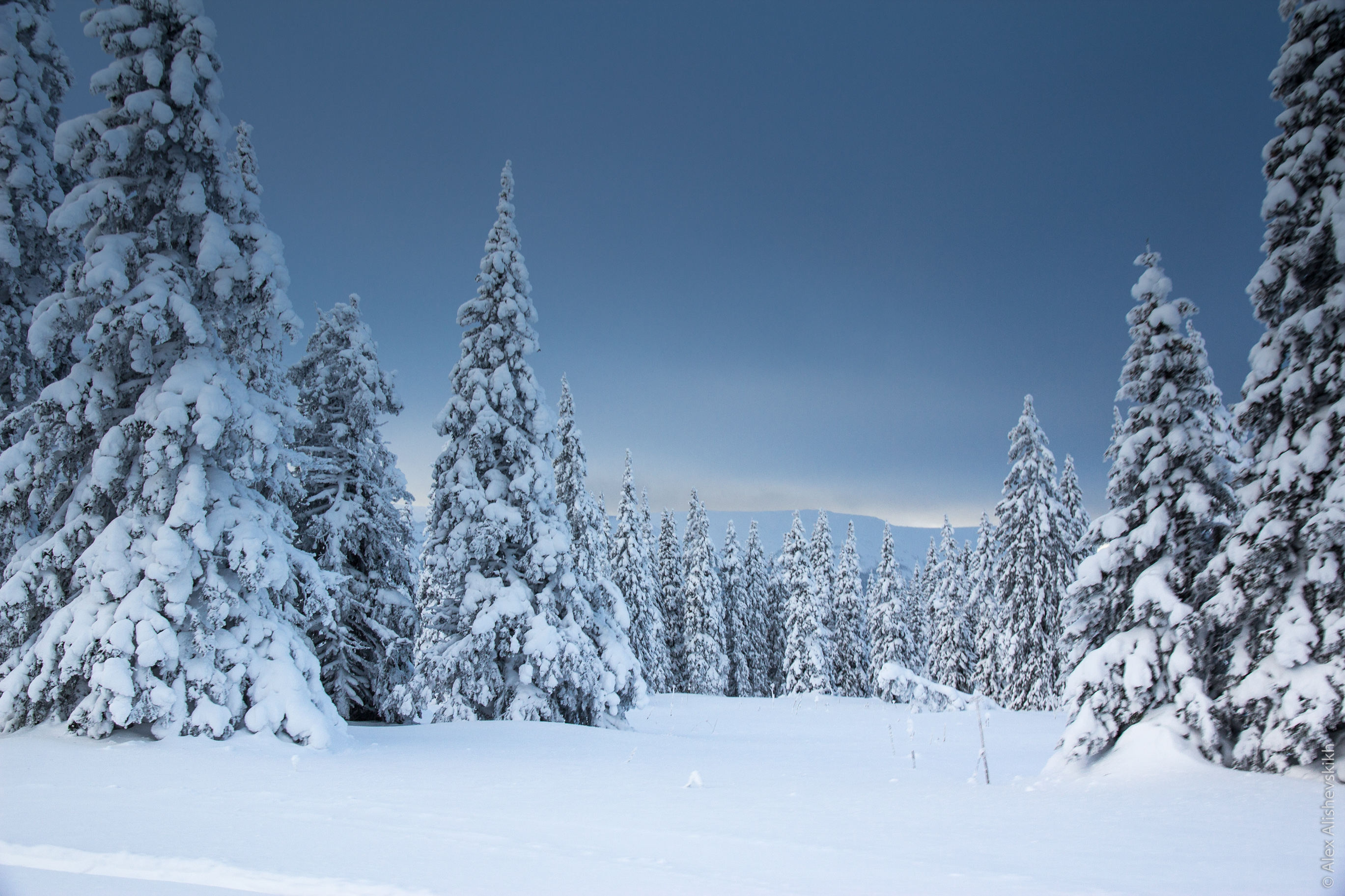 Winter woods